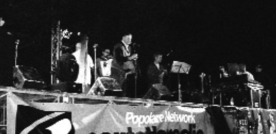 Foto del palco della prima edizione di Urla Padula, sul palco gli E Zezi (2004)